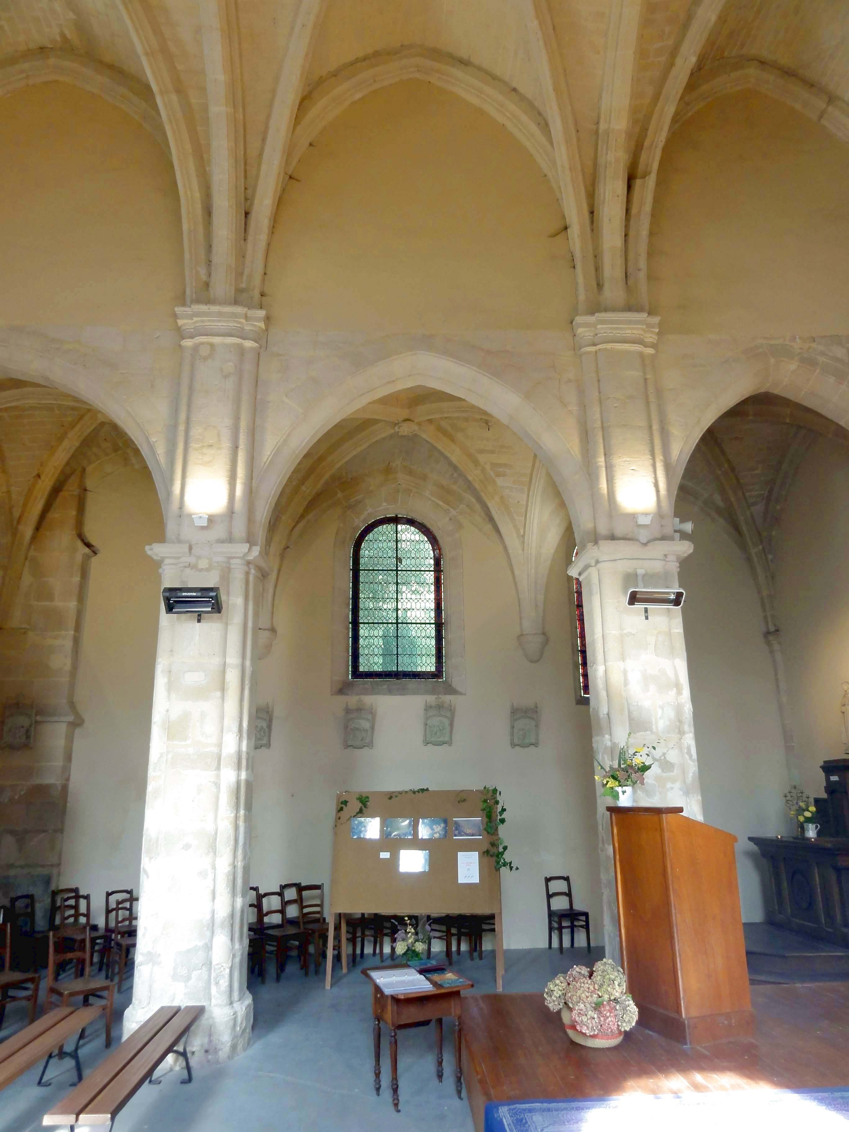 Intérieur de l'église - voir titre.